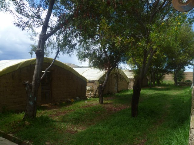 Invernaderos